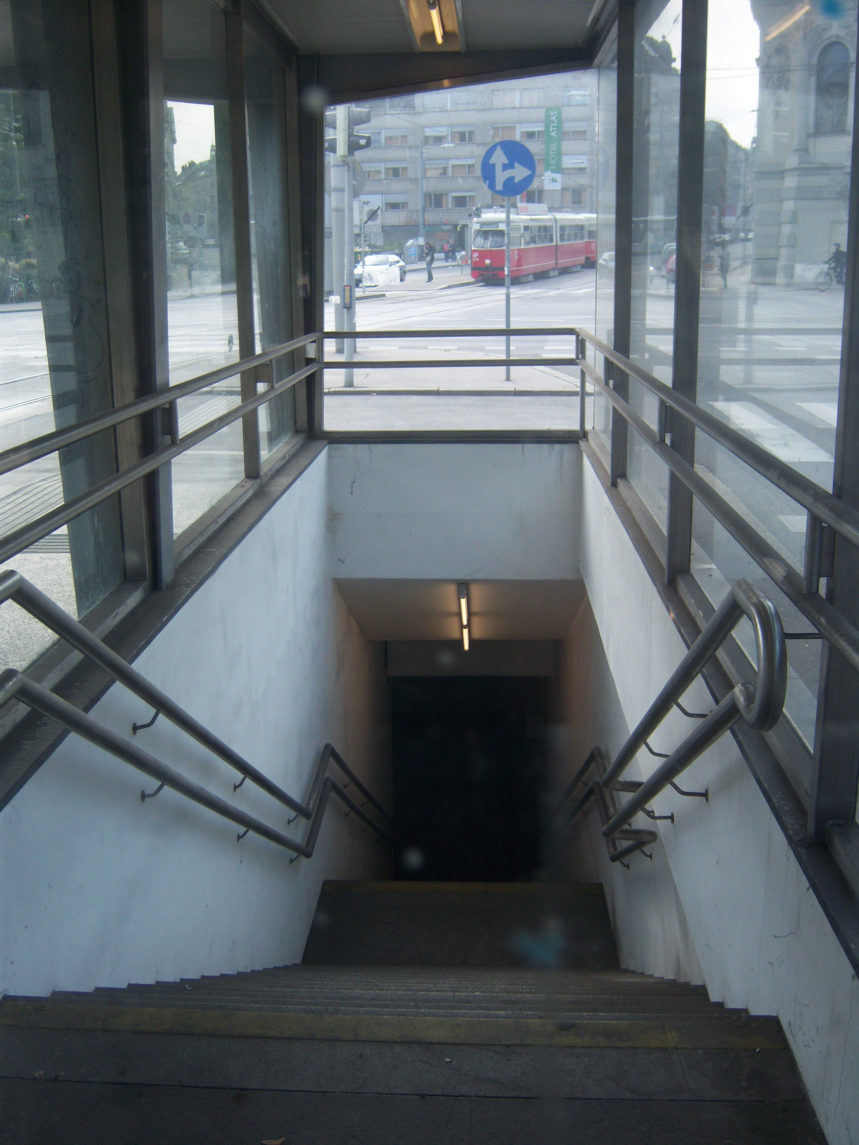 Zugang zur 2003 aufgelassenen U-Bahn-Station Lerchenfelder Straße